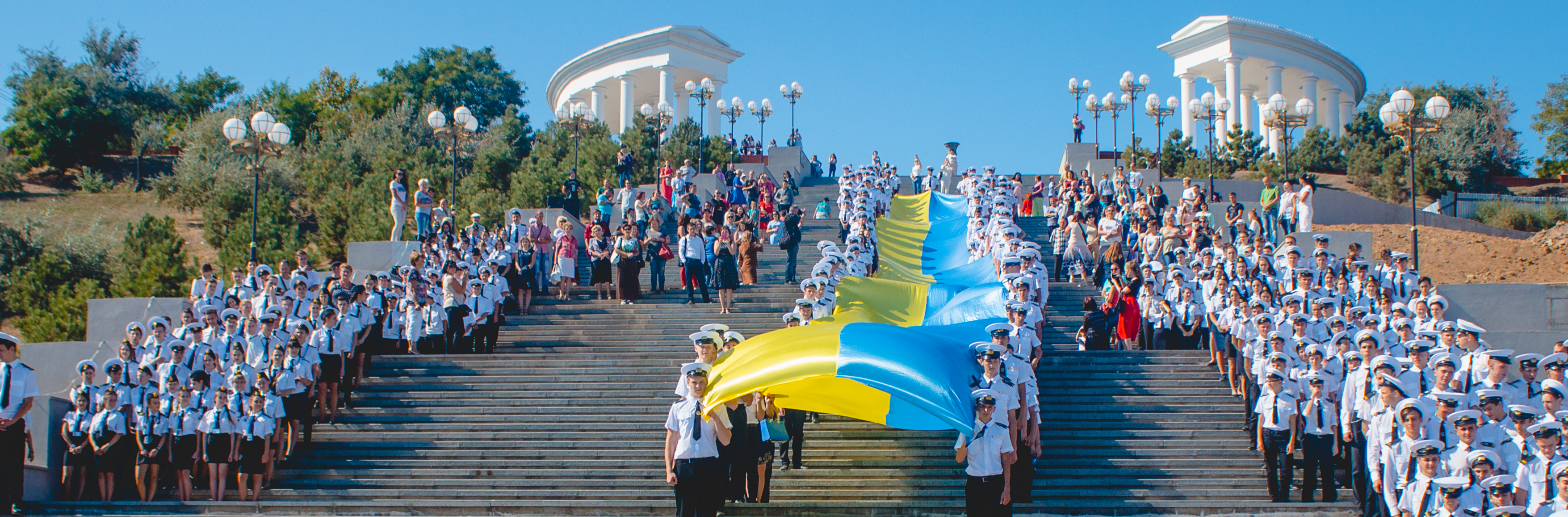 Первокурсники Черноморского морского колледжа ОНМУ на Приморской лестнице